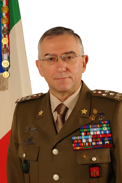 Claudio Graziano Capo di stato maggiore dell'Esercito italiano (dal 2011).